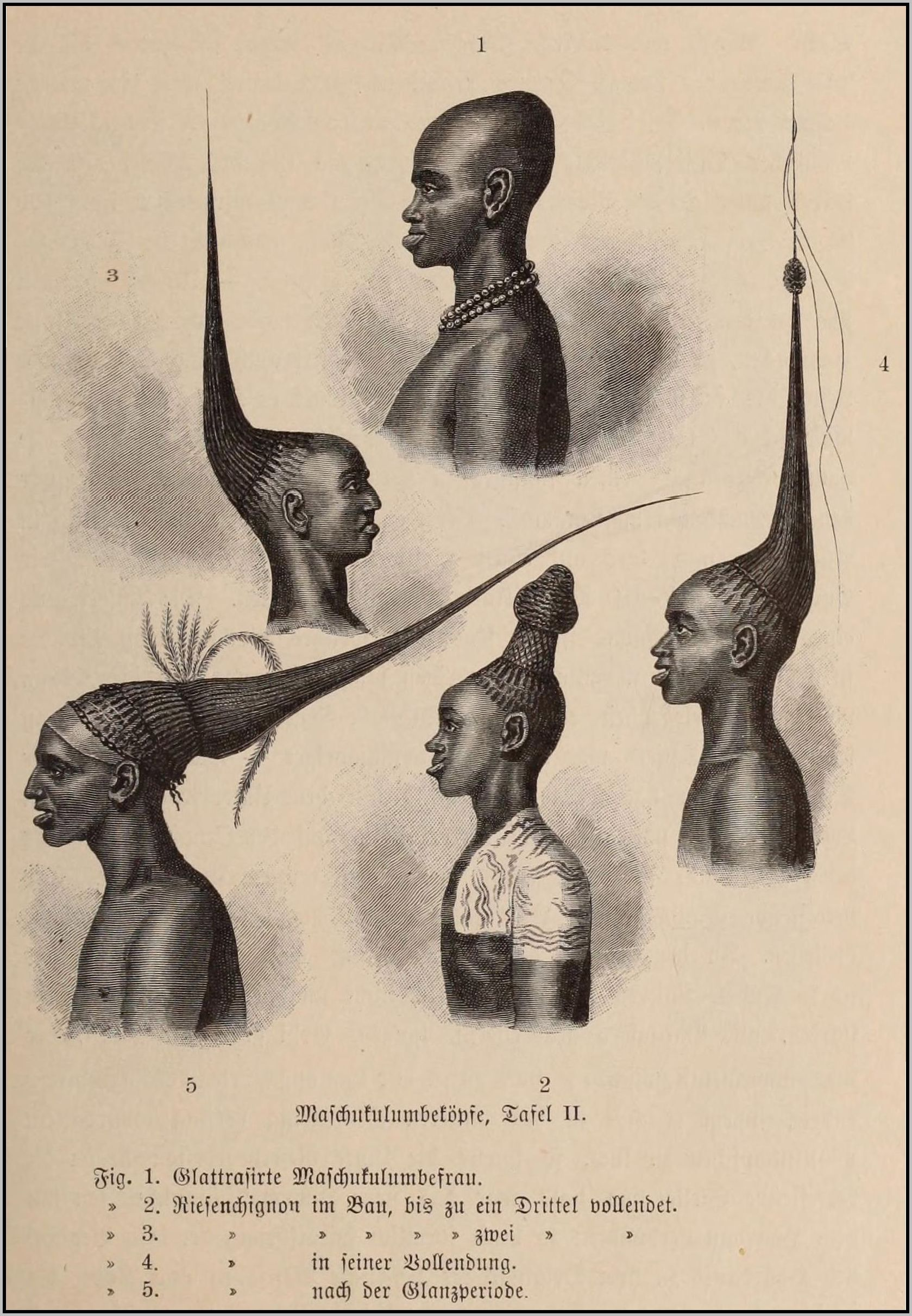 Emil Holub (Holice, 1847. október 7. – Bécs, 1902. február 21.), cseh orvos, utazó, Afrika-felfedező, író, térképész, néprajzi gyűjtő. Von der Capstadt ins Land der Maschukulumbe /A Fokvárostól a masukulumbék országába 1883–1887./(Wien, 1888–1890) 2. kötet, 209. oldal. Masukulube fejek, II. tábla. 1. Simára borotvált masukulumbe nő, 2. Óriás chignon építés alatt, legfeljebb egyharmadra kész, 3. Óriás chignon építés alatt, legfeljebb kétharmadra kész, 4. Óriás chignon a maga tökéletességében, 5. Óriás chignon a „tökéletes” időszak után.